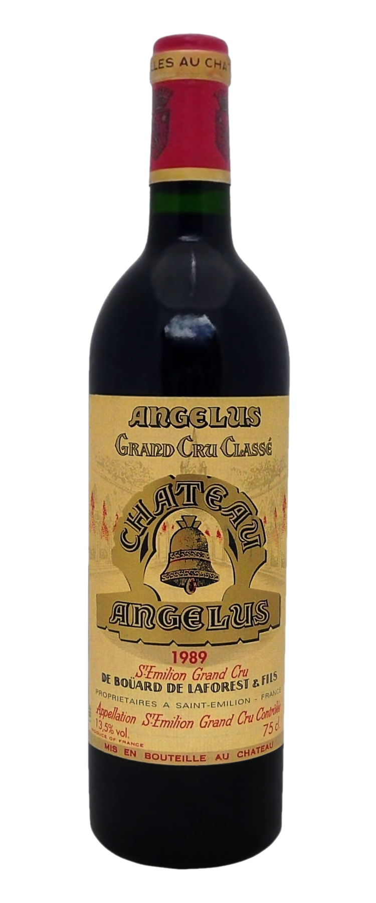 Eine Flasche Angelus 1989. Château Angélus ist ein berühmtes französisches Weingut. Das Weingut aus der Appellation Saint-Émilion ist seit 1996 in der zweithöchsten Premier Grand Cru Classé B-Klassifikation eingestuft.